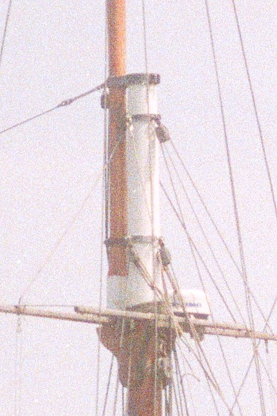 Eselshaupt